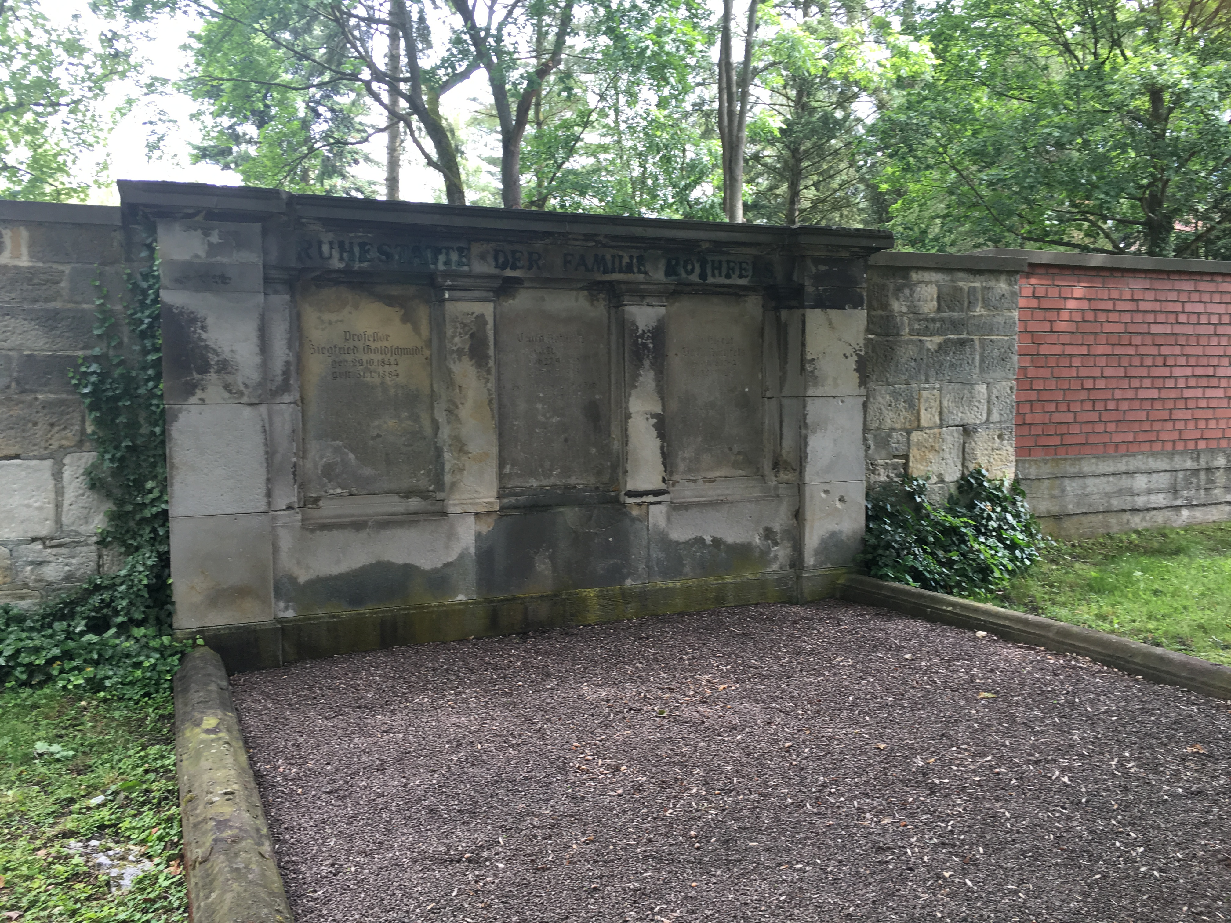 Familiengrab Rothfels Jüdischer Friedhof Kassel-Bettenhausen